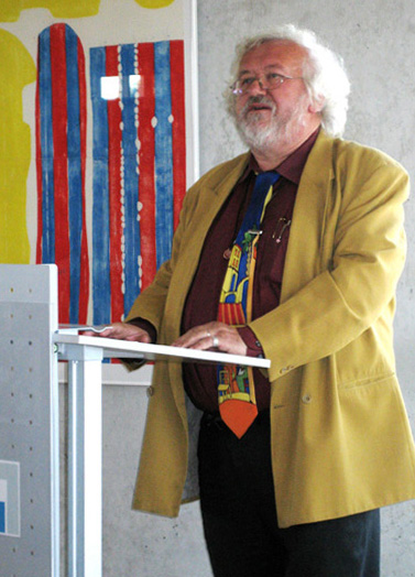 Portraitaufnahme Mathias Ferwagner 2005